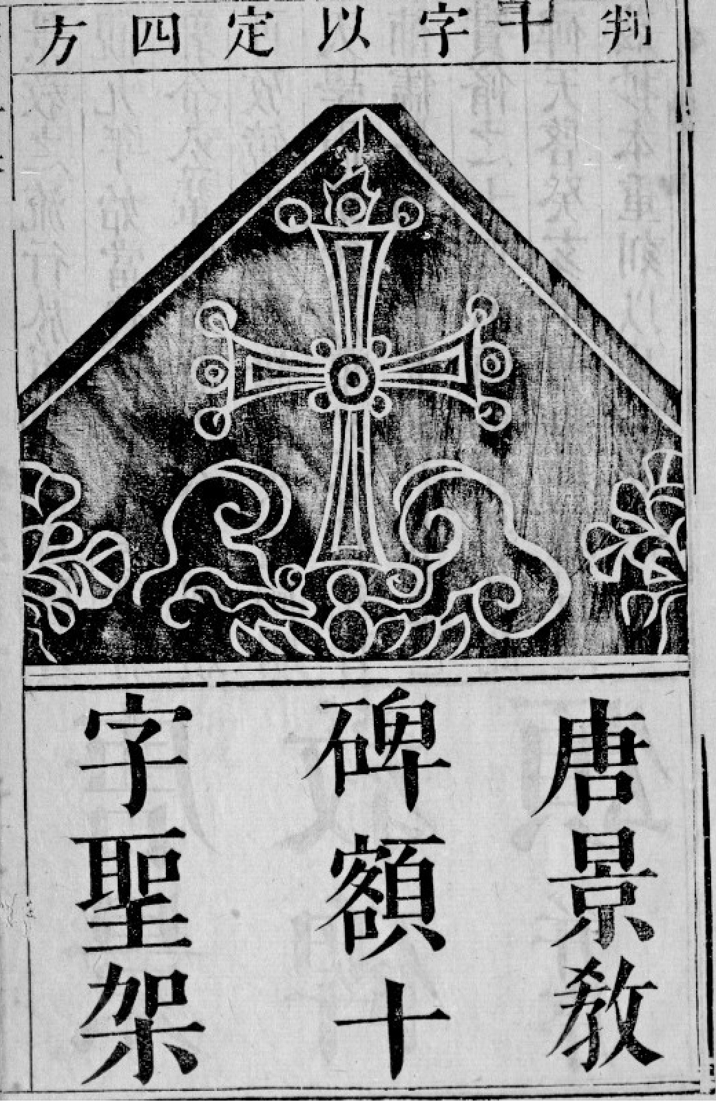 La croix sur la stèle nestorienne, dans le livre Monuments de la religion chrétienne (熙朝崇正集).